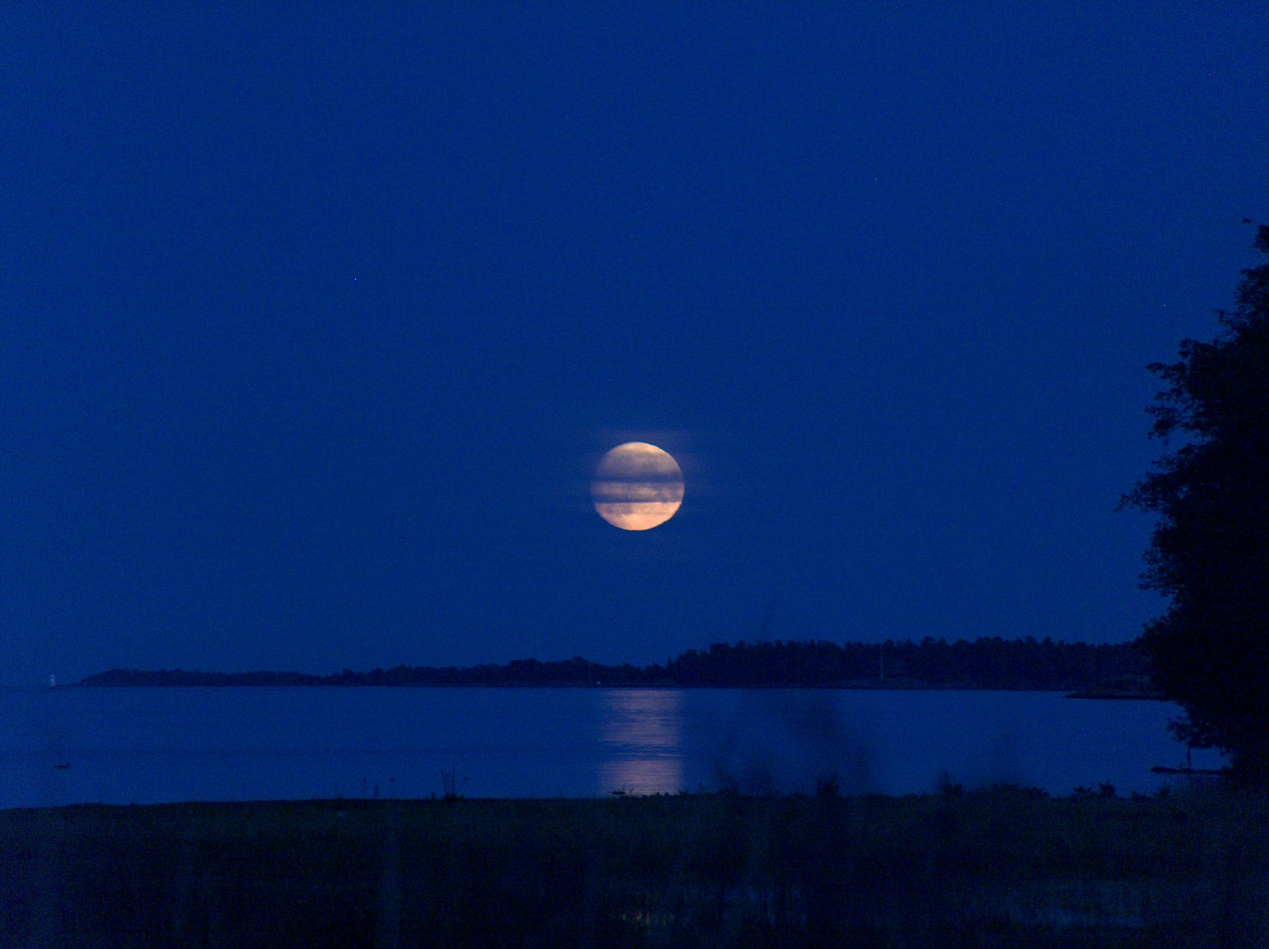 Shot in Nyköping